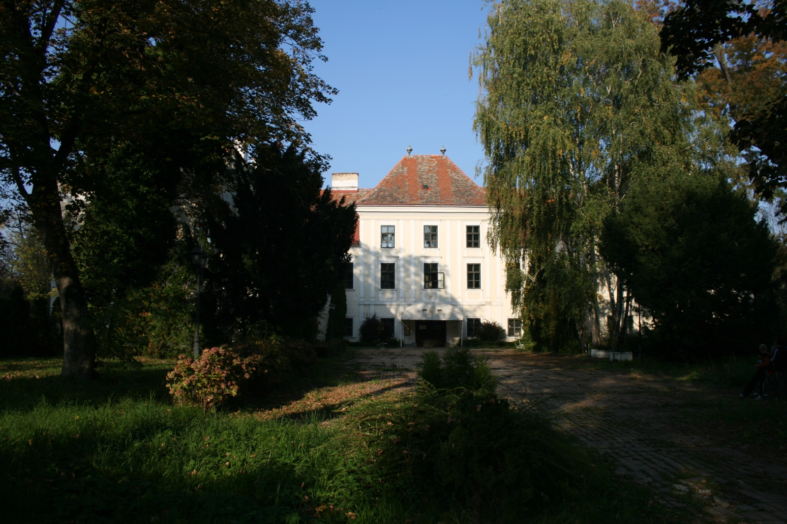 Dvorac Brezovica s južne strane (ulaz)